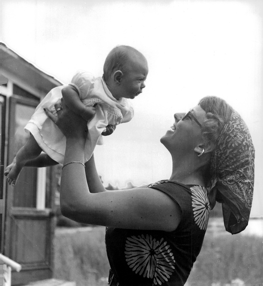 Yvonne Lombard med dottern Susanna hör till sommargästerna i Furusund.